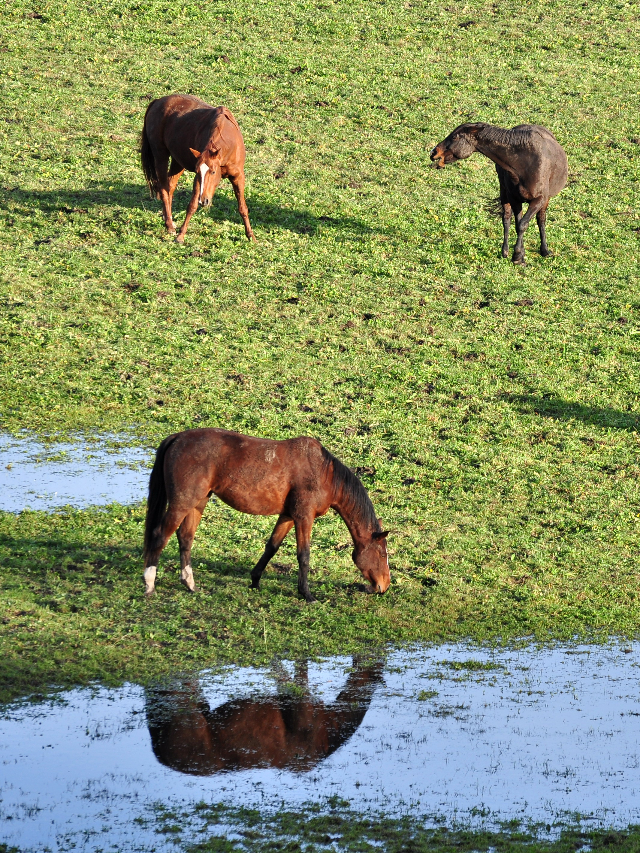 Weid in Rüti (Switzerland)